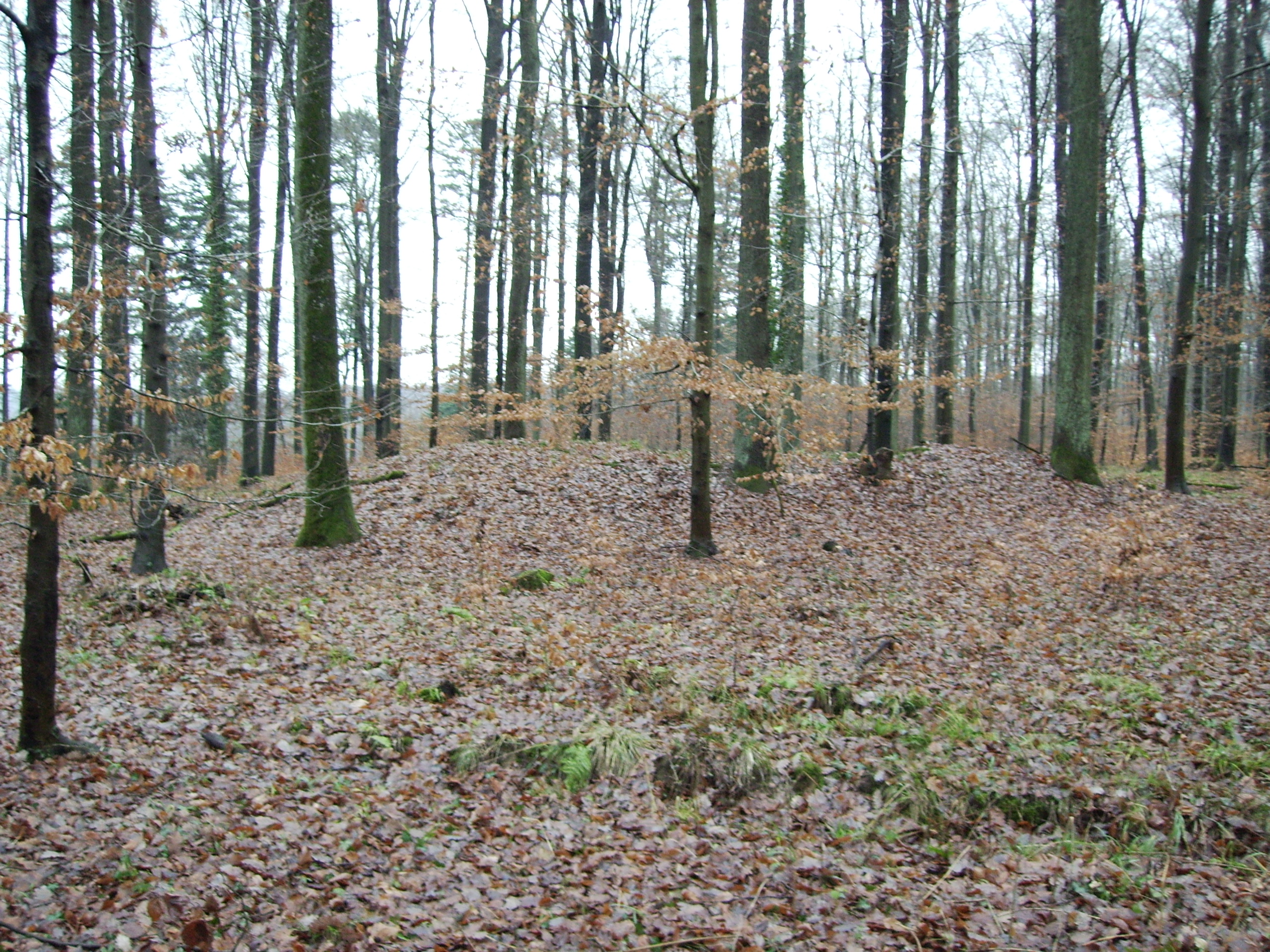 Keltisches Hügelgrab bei Eppingen